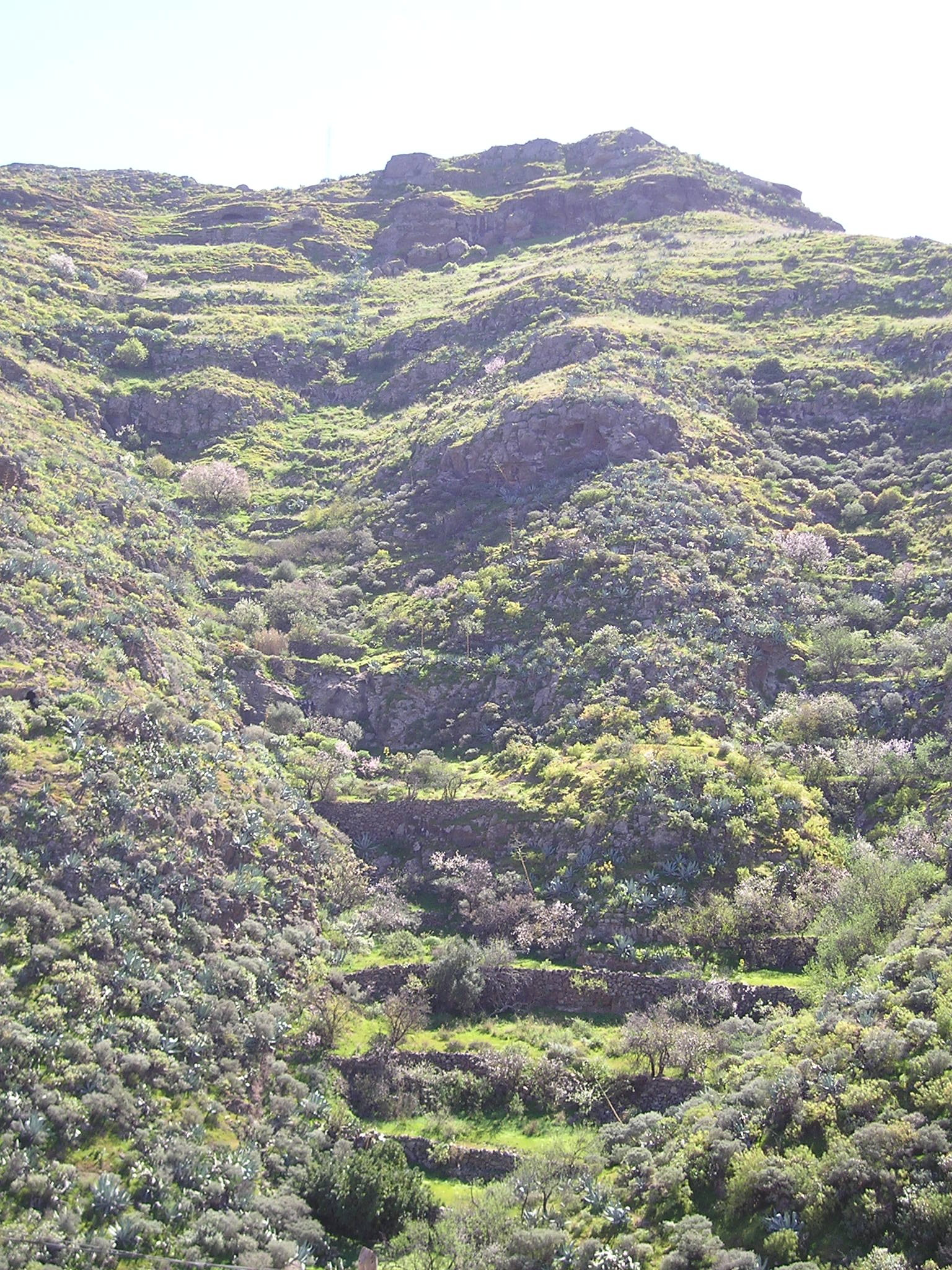 Nateros canarios. Sistema de cultivo basado en la recolección de agua. Valsequillo (Gran Canaria). Canarias, Gran Canaria